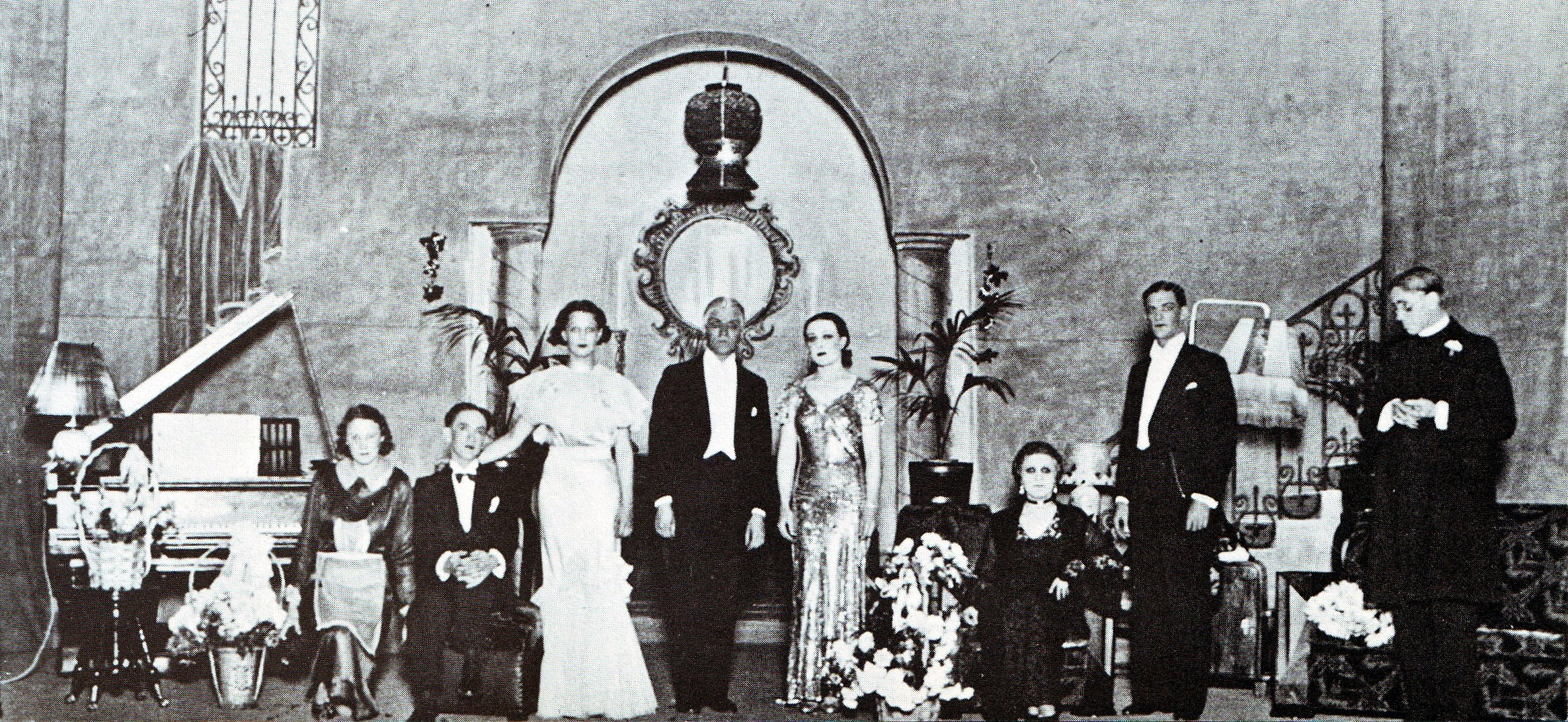 Haar egskeiding (Clemence Dane se Bill of Divorcement) is in 1935 deur die Huguenet-geselskap opgevoer. Die aktrise heel links is onbekend. Langs haar sit Siegfried Mynhardt en dan volg Ena du Toit, André Huguenet, Lydia Lindeque, Paula Styger, Nico van Rooyen en Dewald van der Merwe. Die dekor was deur Cecil Pym van Kaapstad en die foto is op die verhoog van die ou His Majesty-teater in Johannesburg geneem.